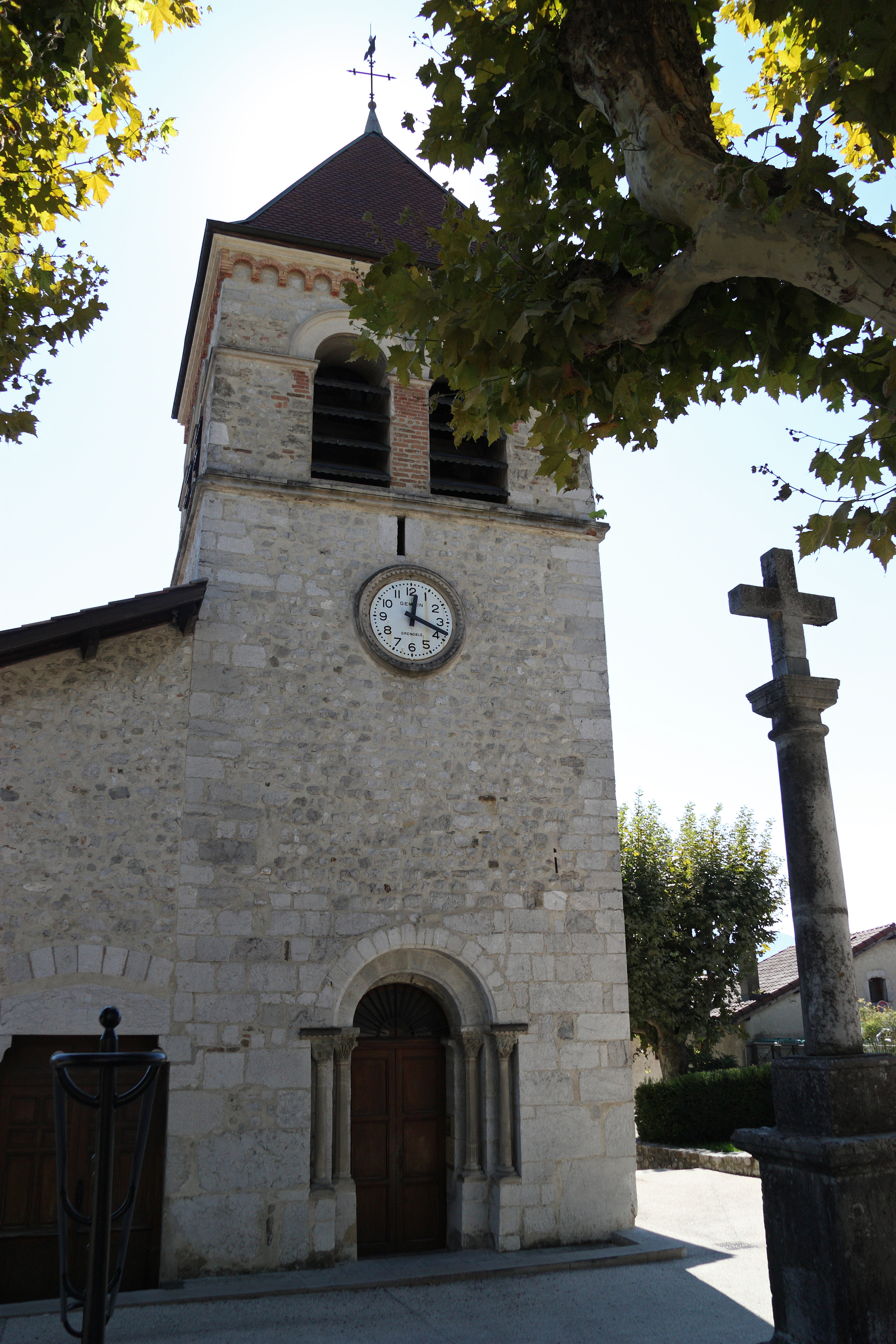 Église Saint-Philibert de Saint-Ismier, (Classé, 1908) .